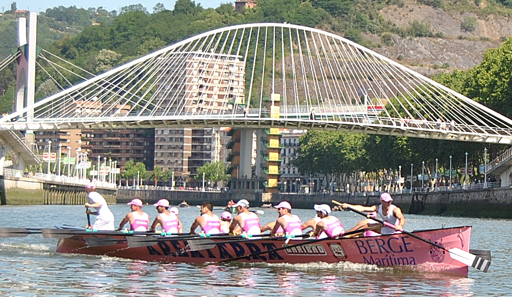 Trainière du club Raspas (Getxo - Biscaye) dans Communauté autonome du Pays basque.